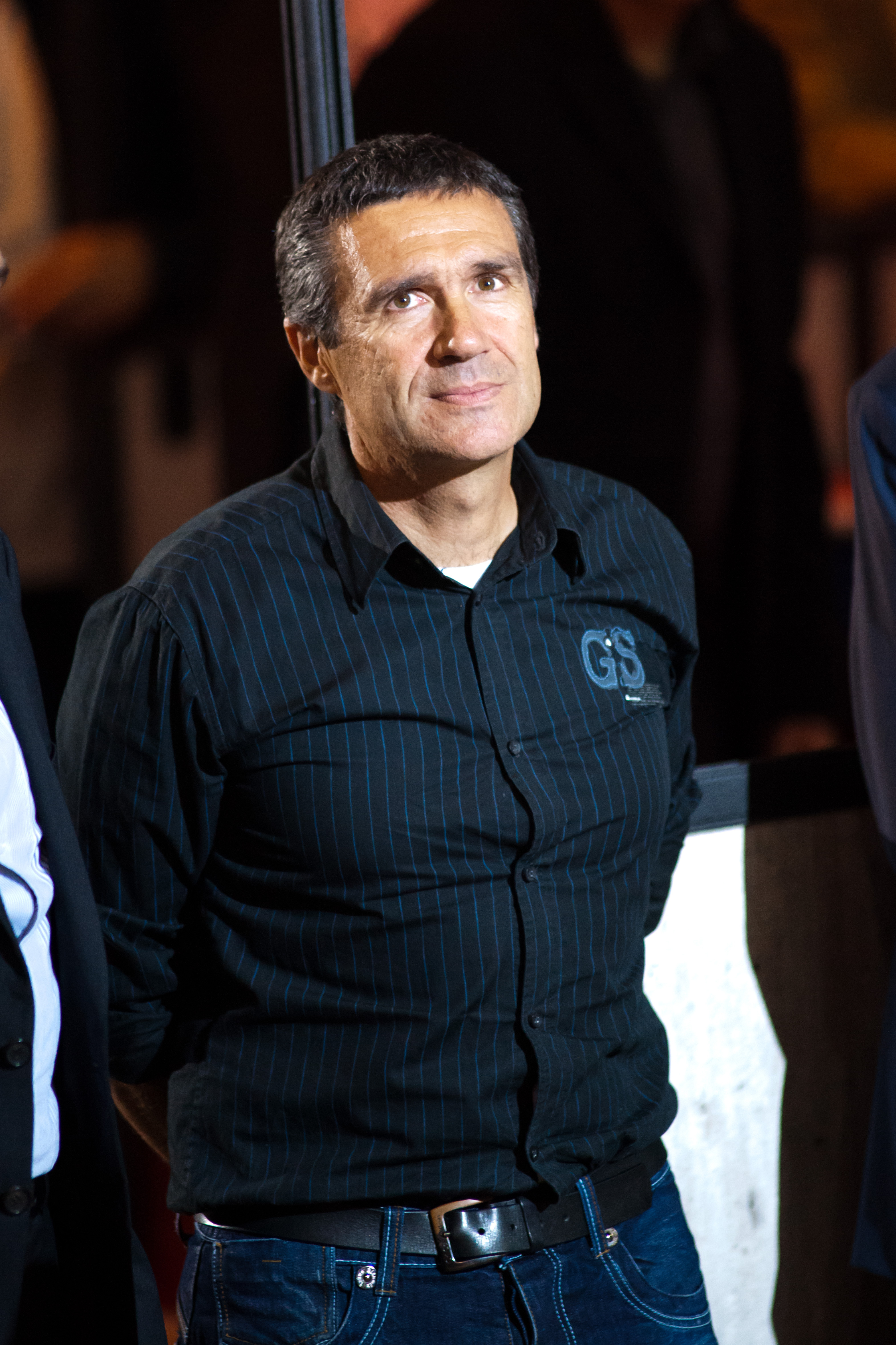 Adriano Baffi aux Six jours de Grenoble 2011